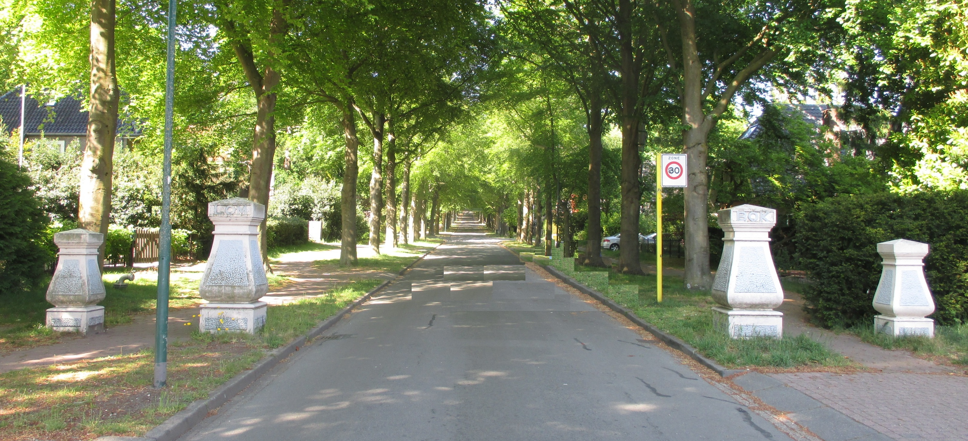 Lombokpalen aan de ingang van de Lomboklaan in 2019